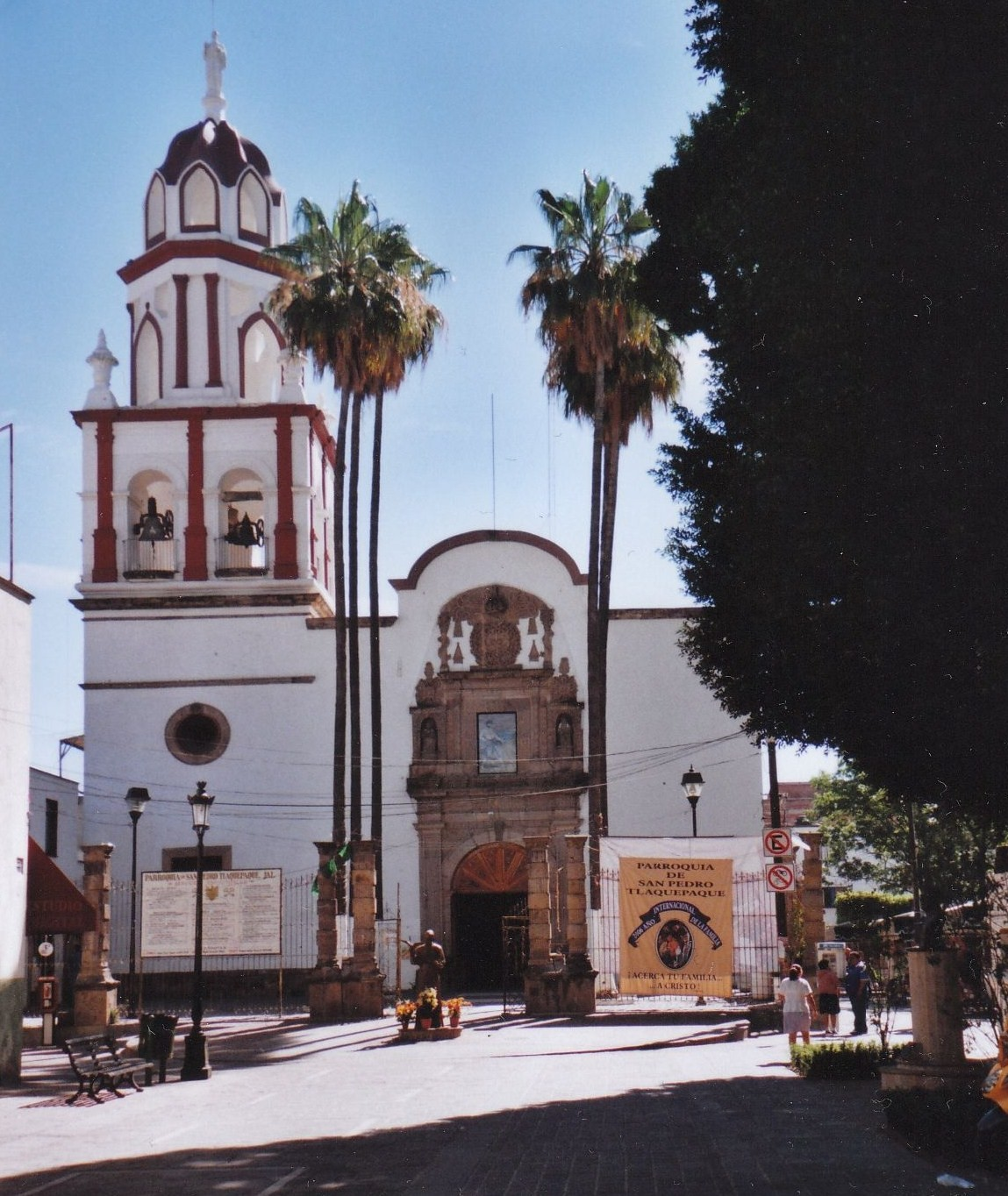 Kirche San Pedro in San Pedro Tlaquepaque, Jalisco